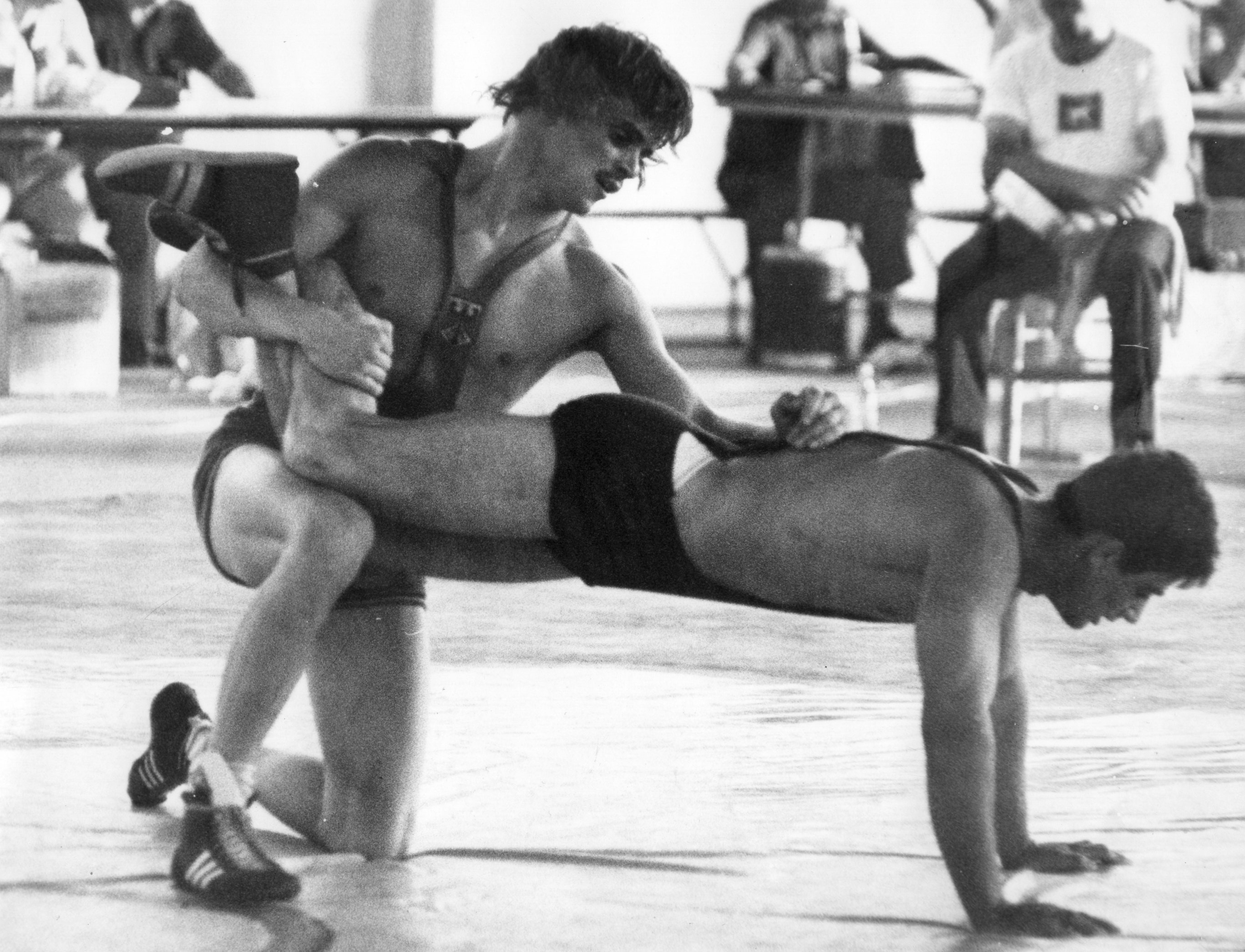 Gerhard Sattel (links) - Internationales Turnier in Griechenland (1978)